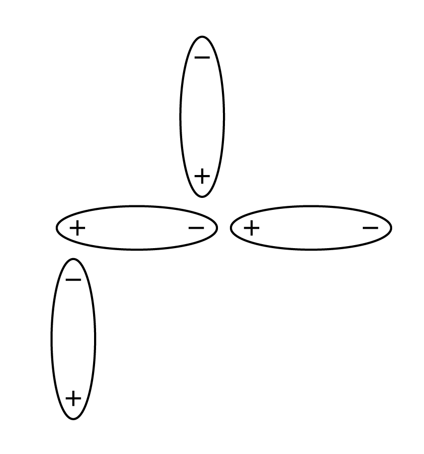 Remplazo de imagen